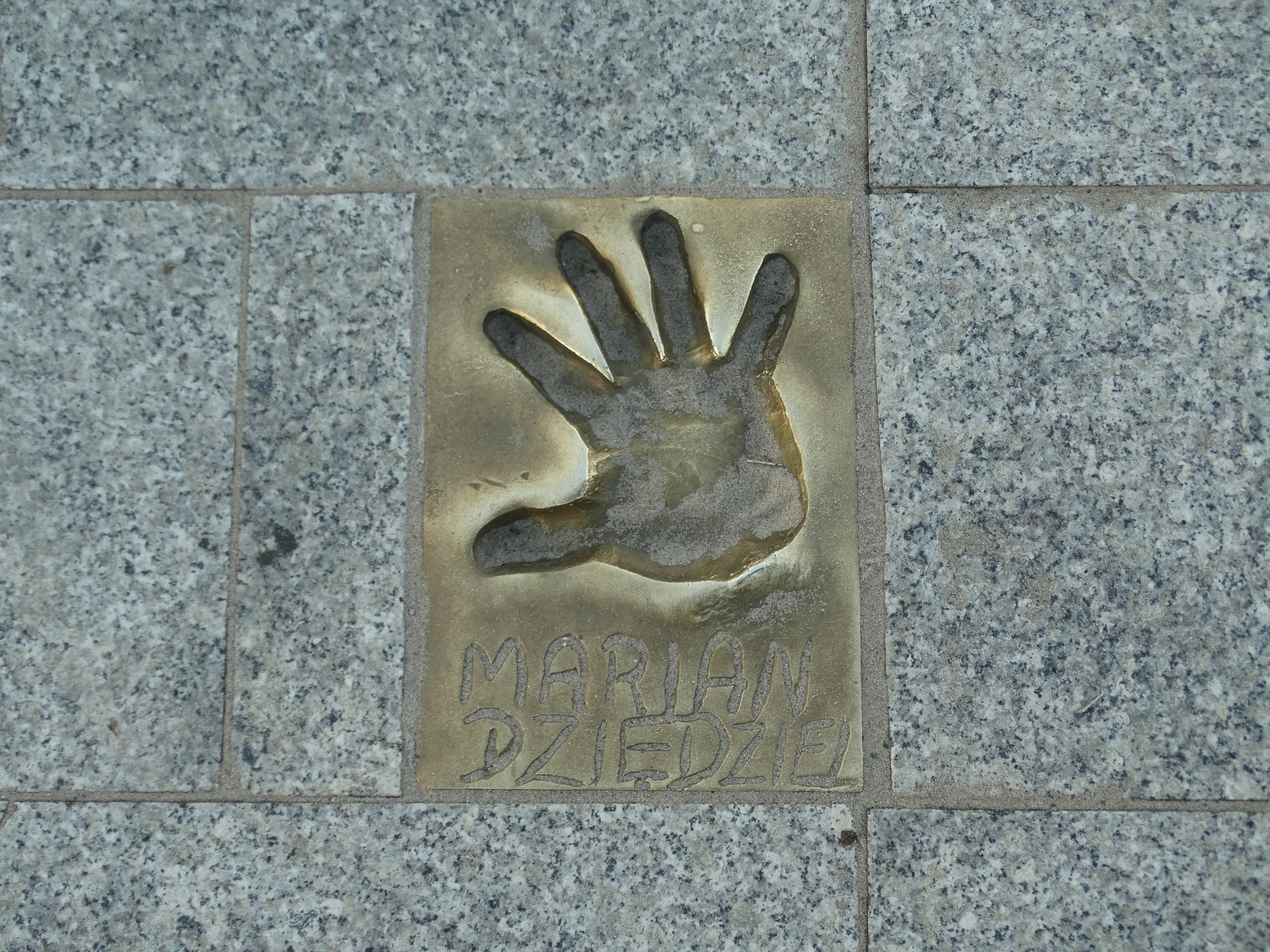 Międzyzdroje, Aleja Gwiazd - Marian Dziędziel